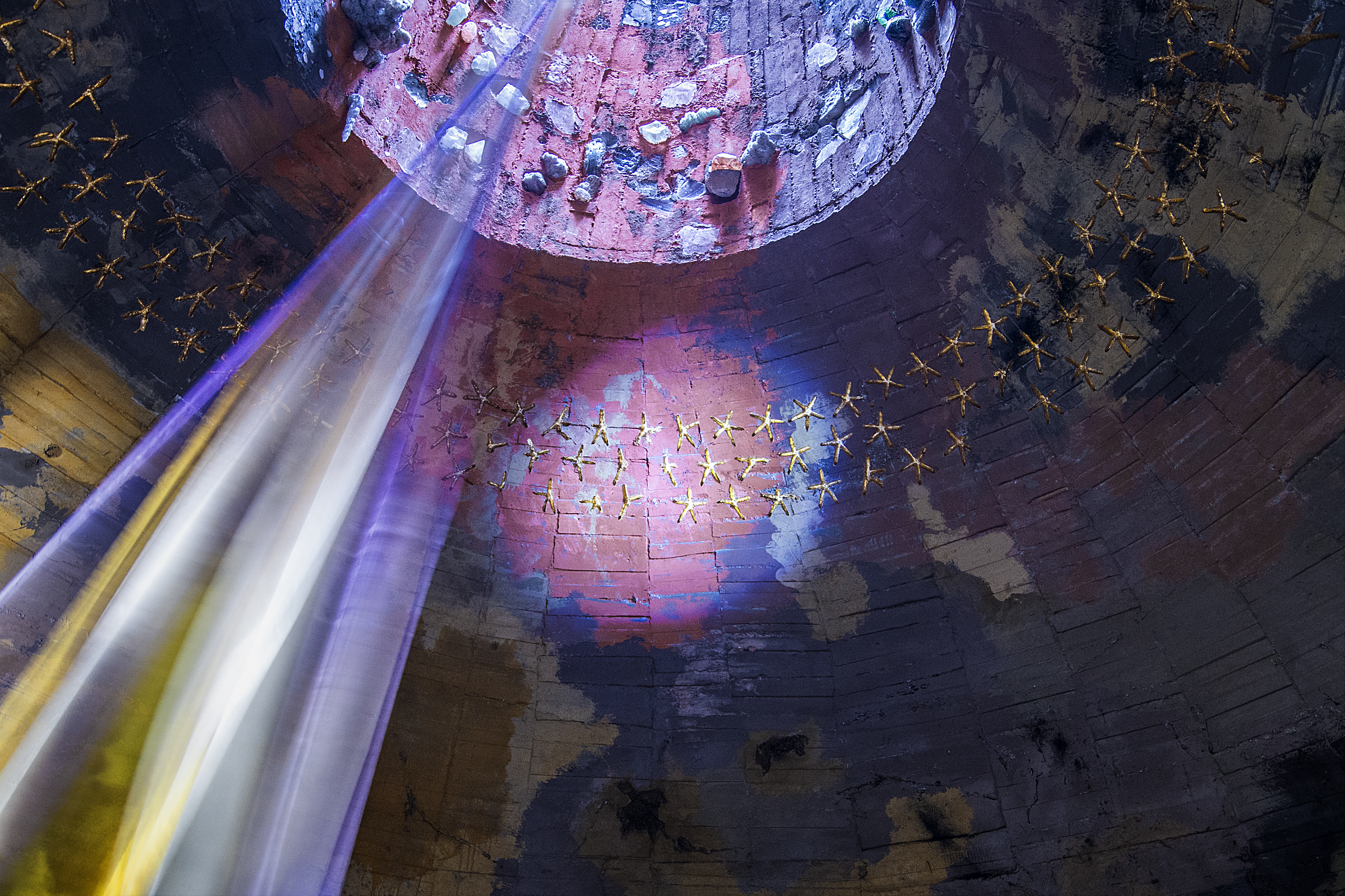 Sluneční hora - interiér